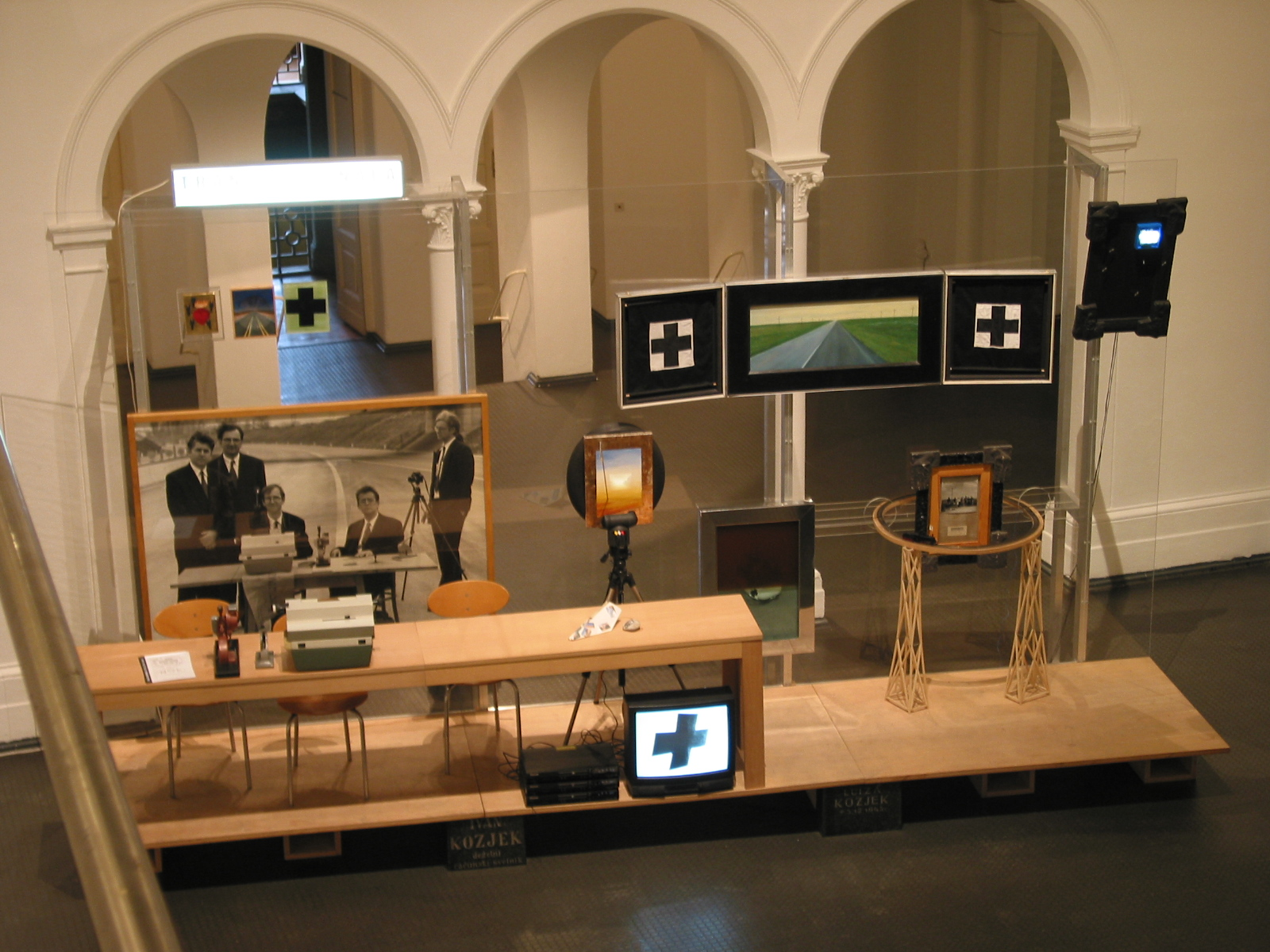 Kunstinstallation der Gruppe IRWIN "Transnacionala", Berlin 2003